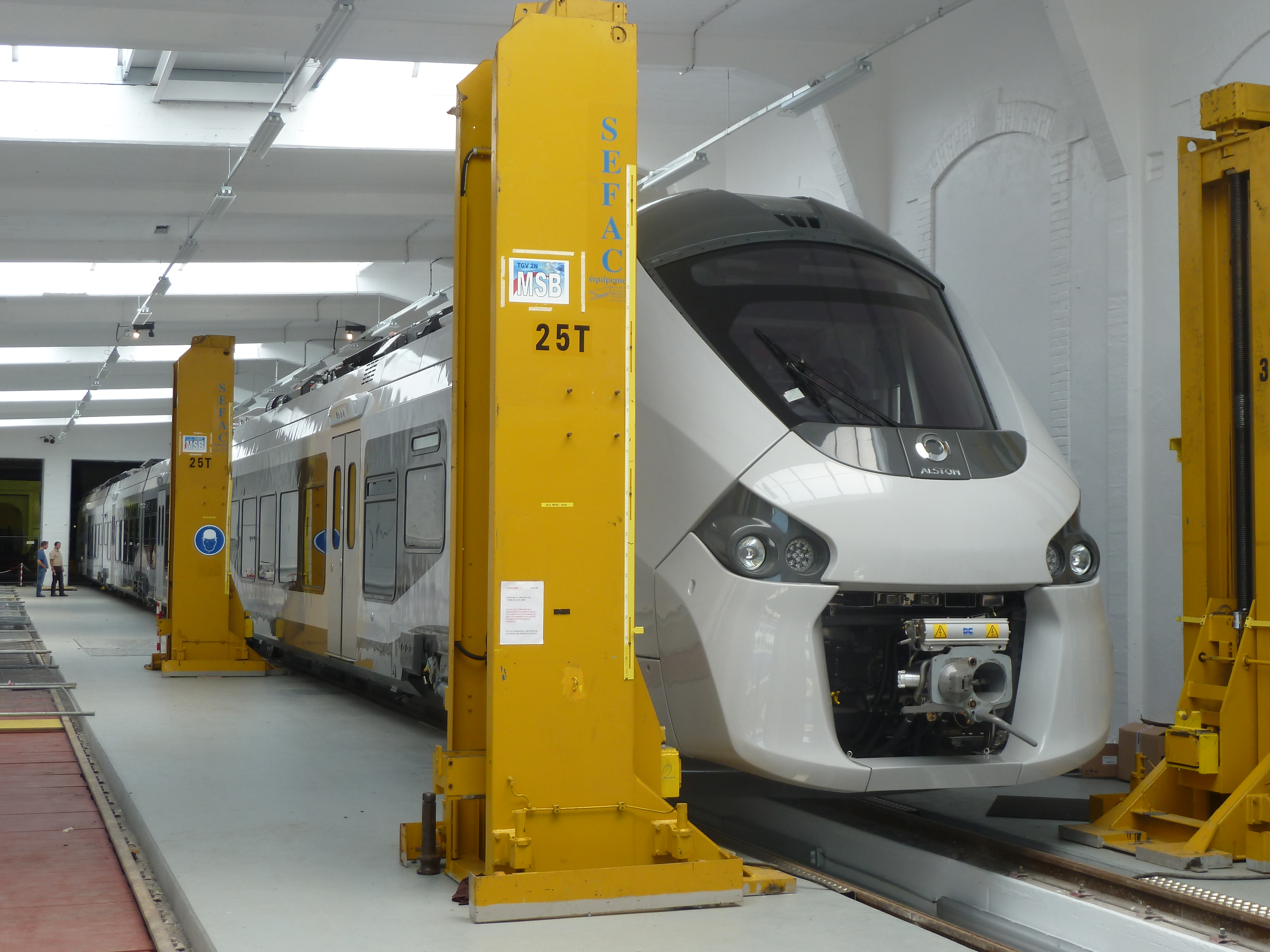 Premier train complet dévoilé en juin 2011 par ALSTOM Transport